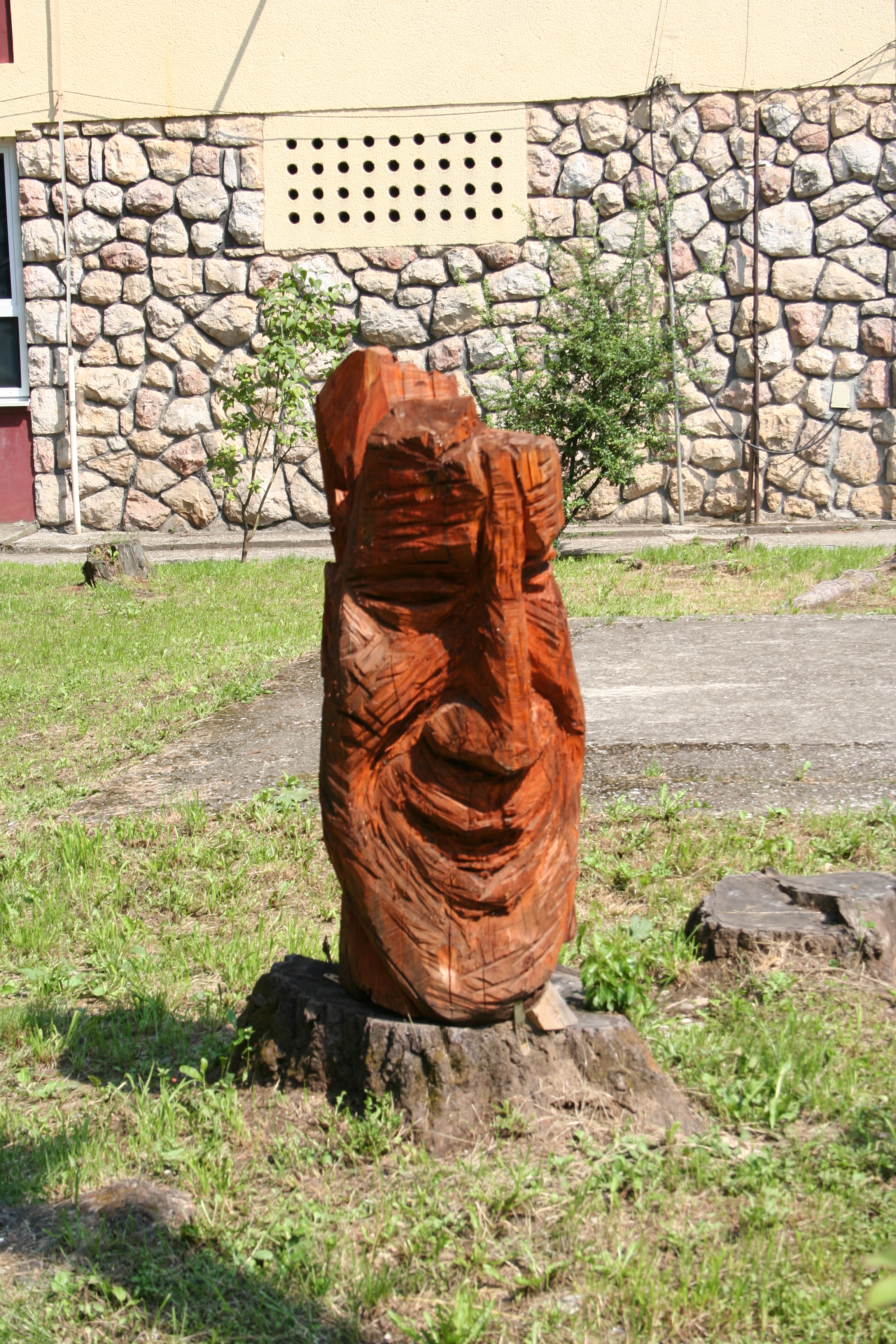 Skulptura u dvorištu osnovne škole, Mali Zvornik